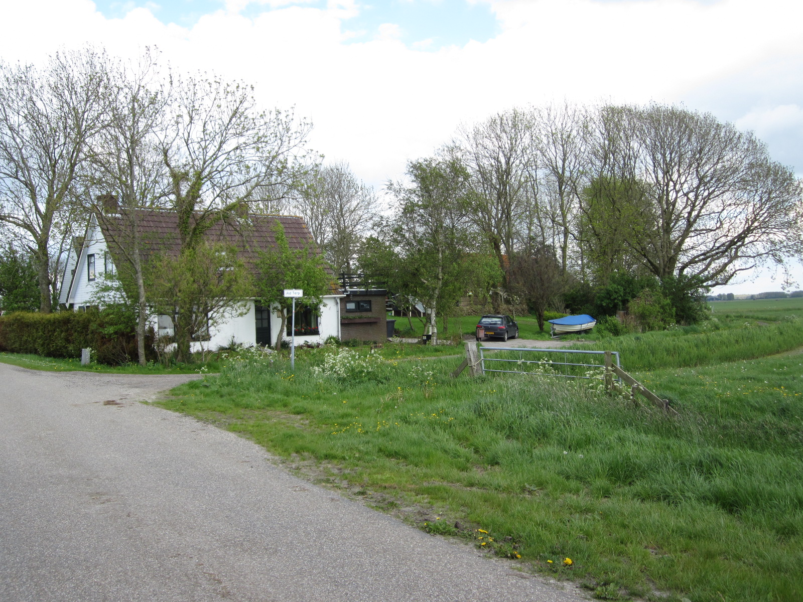 Buurtschap Ald Terp, nabij buurtschap Tibma, provincie Friesland. Hamlet Ald Terp, county Friesland, The Netherlands.